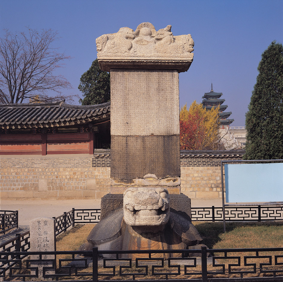 보물 제363호 창원 봉림사지 진경대사탑비 (昌原 鳳林寺址 眞鏡大師塔碑) - 창원 봉림사지 진경대사탑비